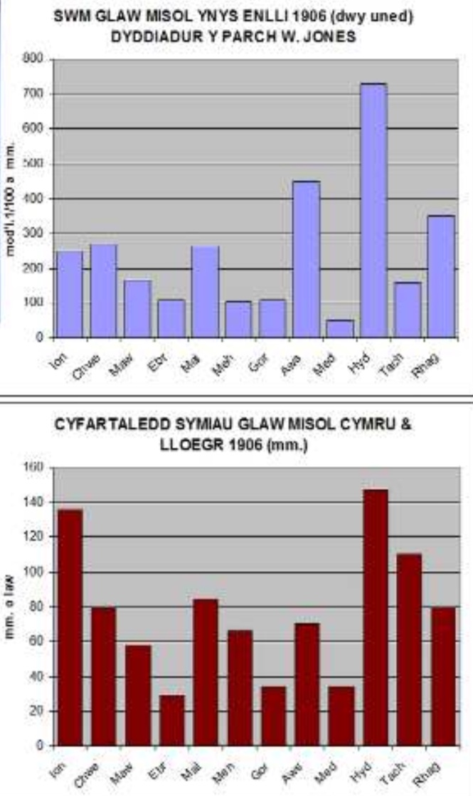 Graff o fesuriadau glaw Ynys Enlli 1906, a godwyd o Ddyddiadur Y Parch. William Jones o gymharu a mesuriadau cyfartalog y DG